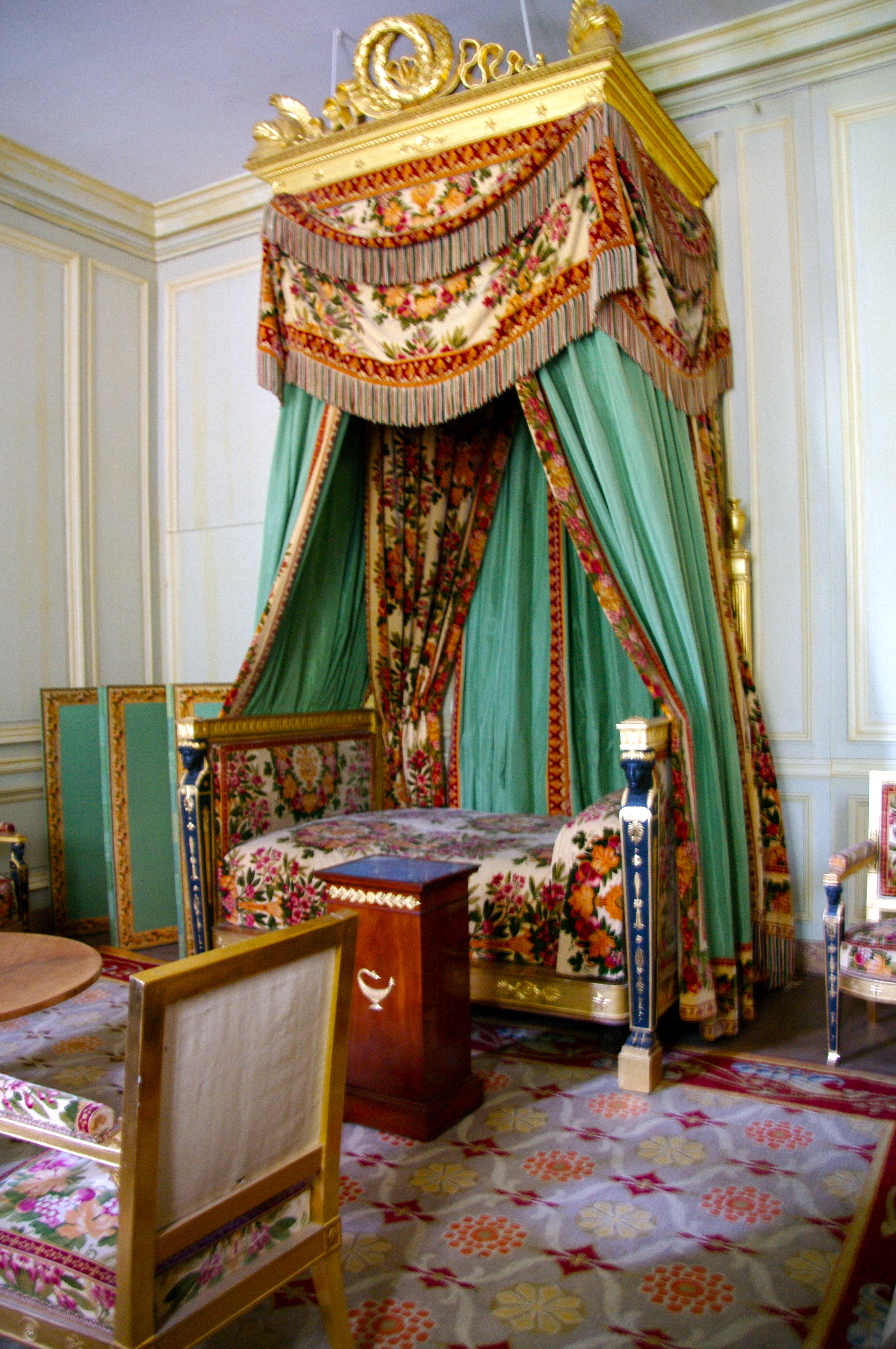 Vue de la chambre à coucher des petits appartements de l'empereur Napoléon I au château de Fontainebleau.